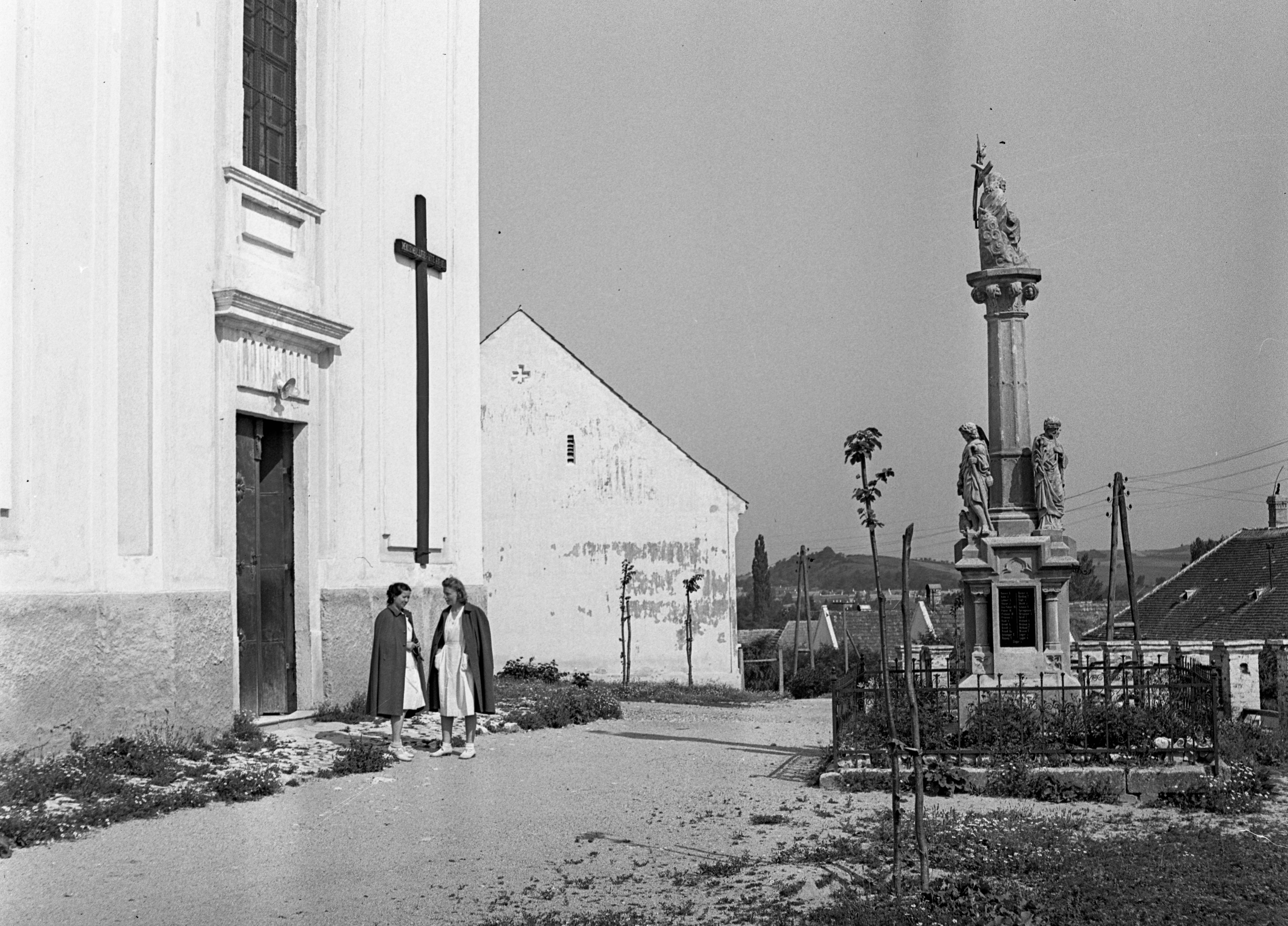 Szentháromság szobor a katolikus templom előtt. Location: Hungary, Bakonyjákó Tags: church, Holy Trinity Statue Title: Szentháromság szobor a katolikus templom előtt.